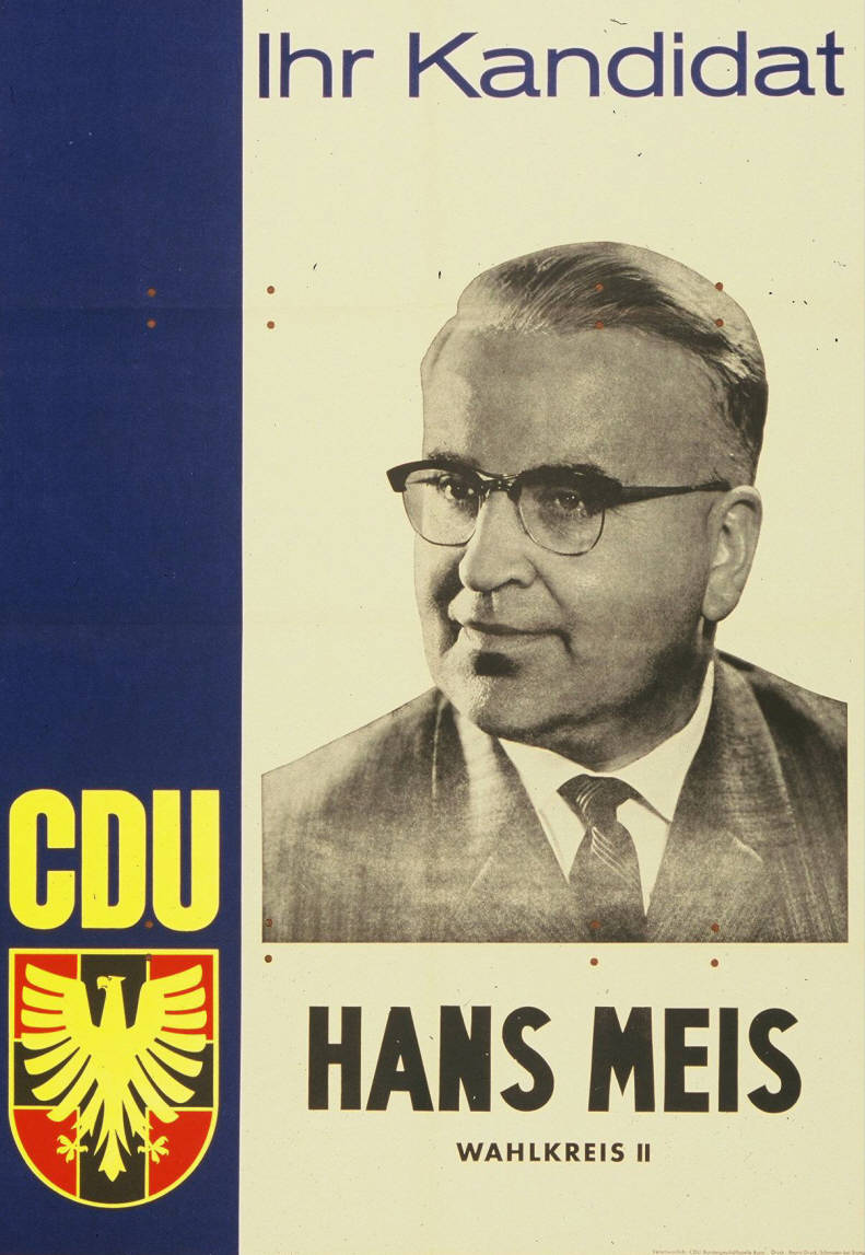 Ihr Kandidat Hans Meis Wahlkreis II Abbildung: Porträtfoto Kommentar: Plakat aus Dortmund Plakatart: Kandidaten-/Personenplakat mit Porträt Auftraggeber: Verantw.: CDU-Bundesgeschäftsstelle Bonn Drucker_Druckart_Druckort: Repro-Druck, Schmiden bei Stuttgart Objekt-Signatur: 10-001: 1084 Bestand: Plakate zu Bundestagswahlen (10-001) GliederungBestand10-18: Plakate zu Bundestagswahlen (10-001) » Die 4. Bundestagswahl am 17. September 1961 » CDU » Mit Porträtfoto Lizenz: KAS/ACDP 10-001: 1084 CC-BY-SA 3.0 DE